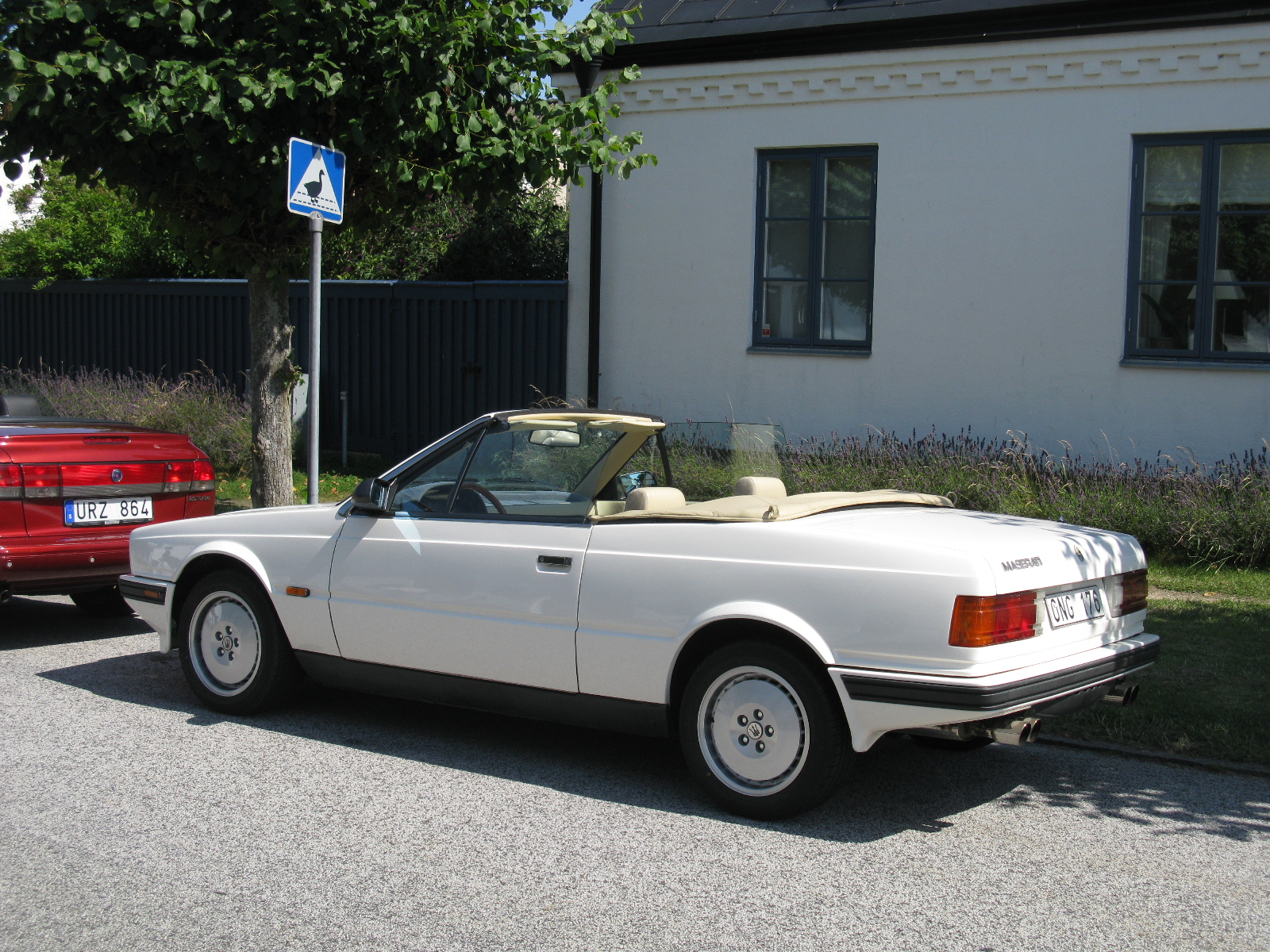 Maserati Biturbo Spider